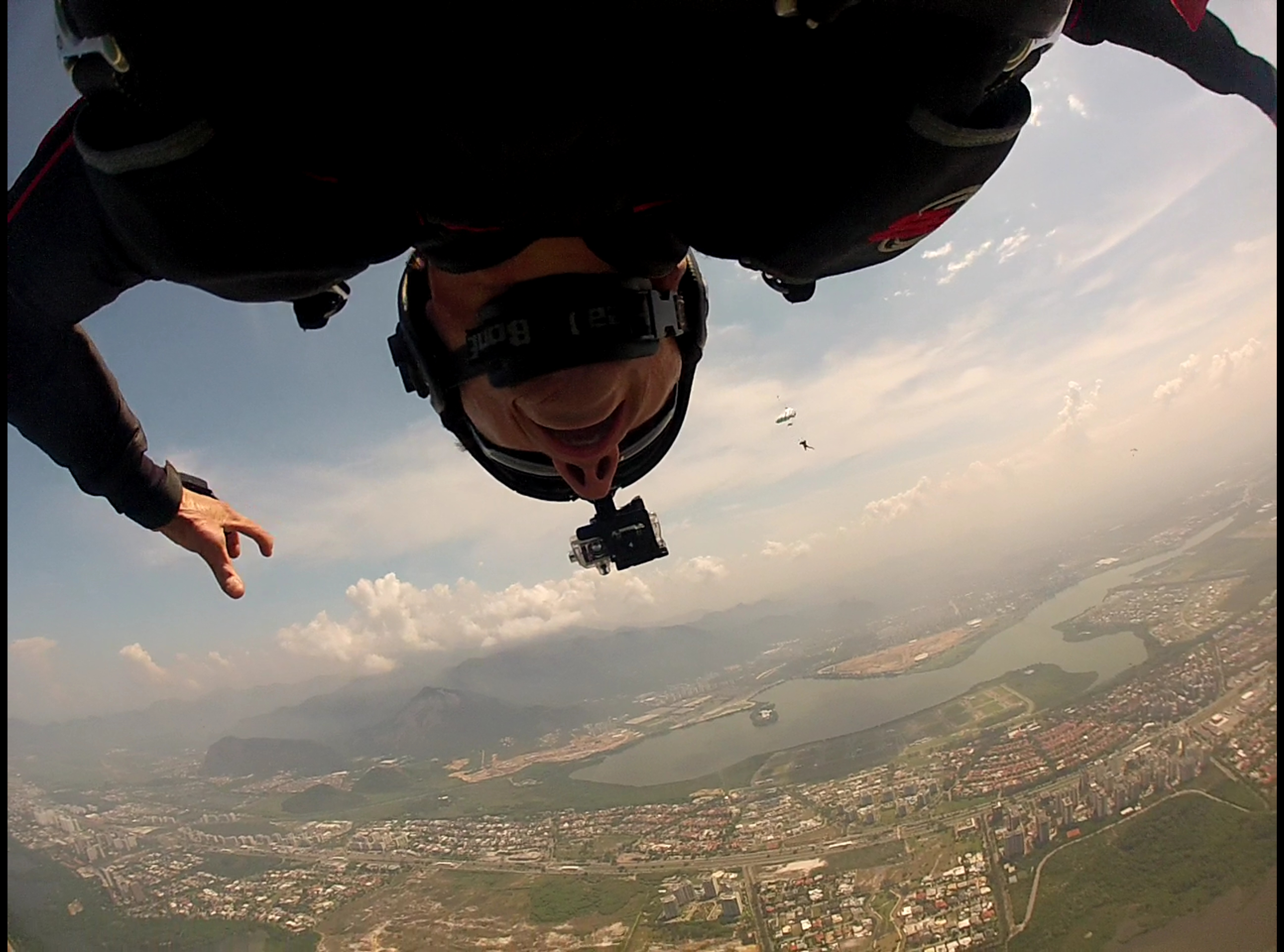 Barra Skydive